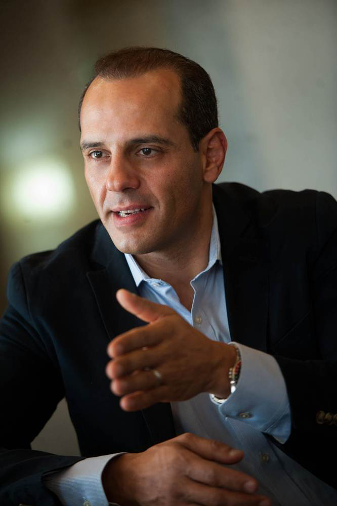 Juan Verde